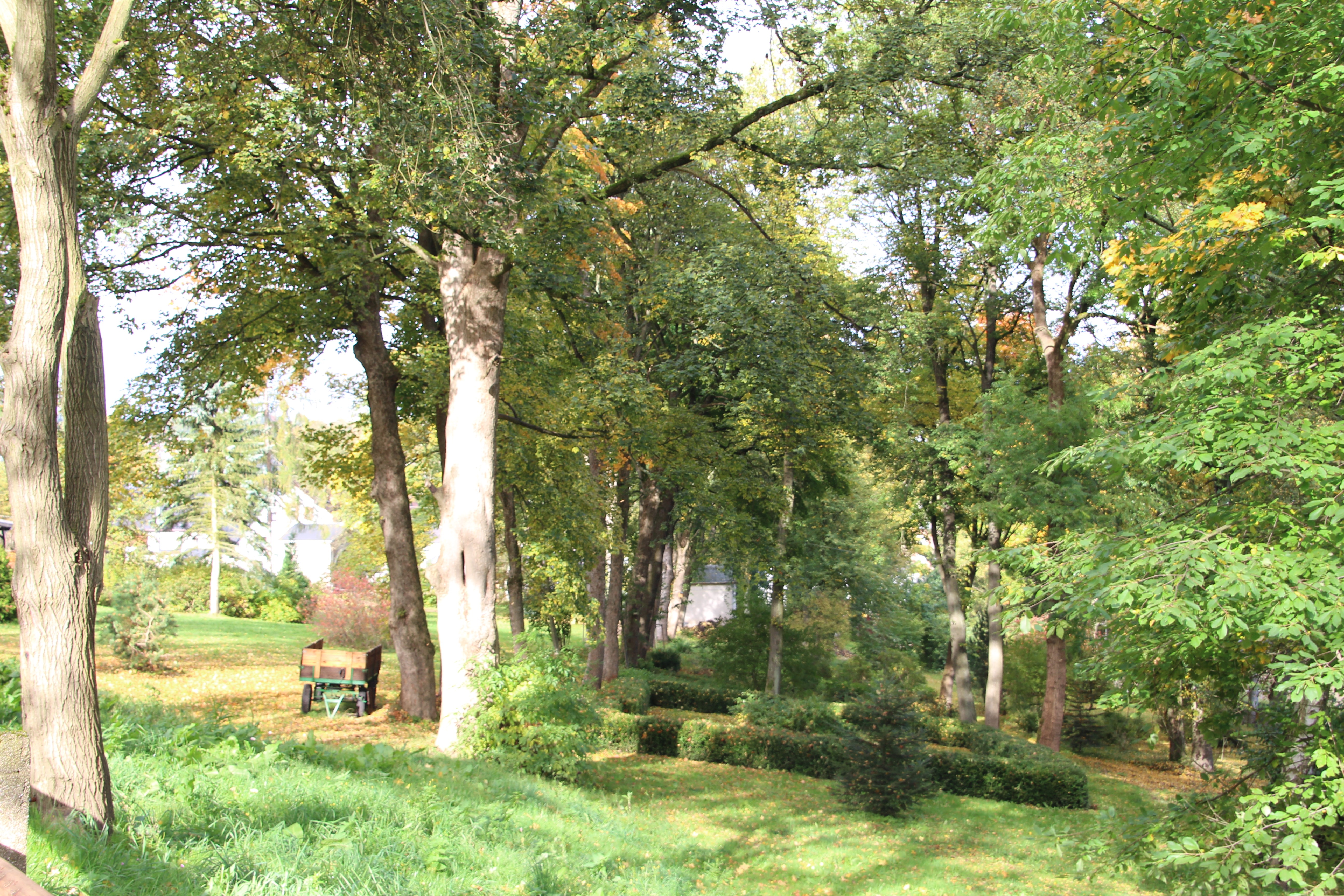 Schönheide im Erzgebirge – Alter Friedhof (Schönheide): Bis zum Jahr 1838 war ein Teil der Fläche des heutigen Marktplatzes und die, auf der seit 1882 das Rathaus steht, der Schönheider Friedhof. Der 1838 angelegte und 1883 erweiterte Friedhof am Rathausberg in der Trägerschaft der Evangelisch-lutherischen Kirchgemeinde Schönheide war bis zum Jahr 1995 Friedhof für die Schönheider, ob sie Mitglied der Schönheider Kirchgemeinde, anderer evangelisch-lutherischer Kirchengemeinden, Mitglied der römisch-katholischen Kirche oder keiner Religionsgruppe angehörten. 1909/1910 wurde die Friedhofskapelle gebaut. Nach der Entfernung fast aller Grabsteine im Jahr 2015, also 20 Jahre nach den letzten Beerdigungen, stehen auf der parkartigen Fläche nur noch die als Kulturdenkmale eingestuften Grabstätten (Gruften) der früheren Eigentümer der Eisengießerei Schönheiderhammer, Familie von Querfurth, und die einiger anderer Familien, denen früher größere Bürstenfabriken gehörten, Familien Flemming und Oschatz. Außerdem gibt es noch einige Grabmäler anderer Familien, so die der Familie C. G. Tuchscherer (Textilien) und F. L. Lenk (Bürsten). Sie sind in mehr oder minder stärkerem Verfall und wurden nur sehr eingeschränkt unterhalten. Heute wird dieser Friedhof als "alter Friedhof" bezeichnet. Vom Jahr 2016 an wurde er als Park umgestaltet und die Grabmale und Gräber denkmalgerecht restauriert